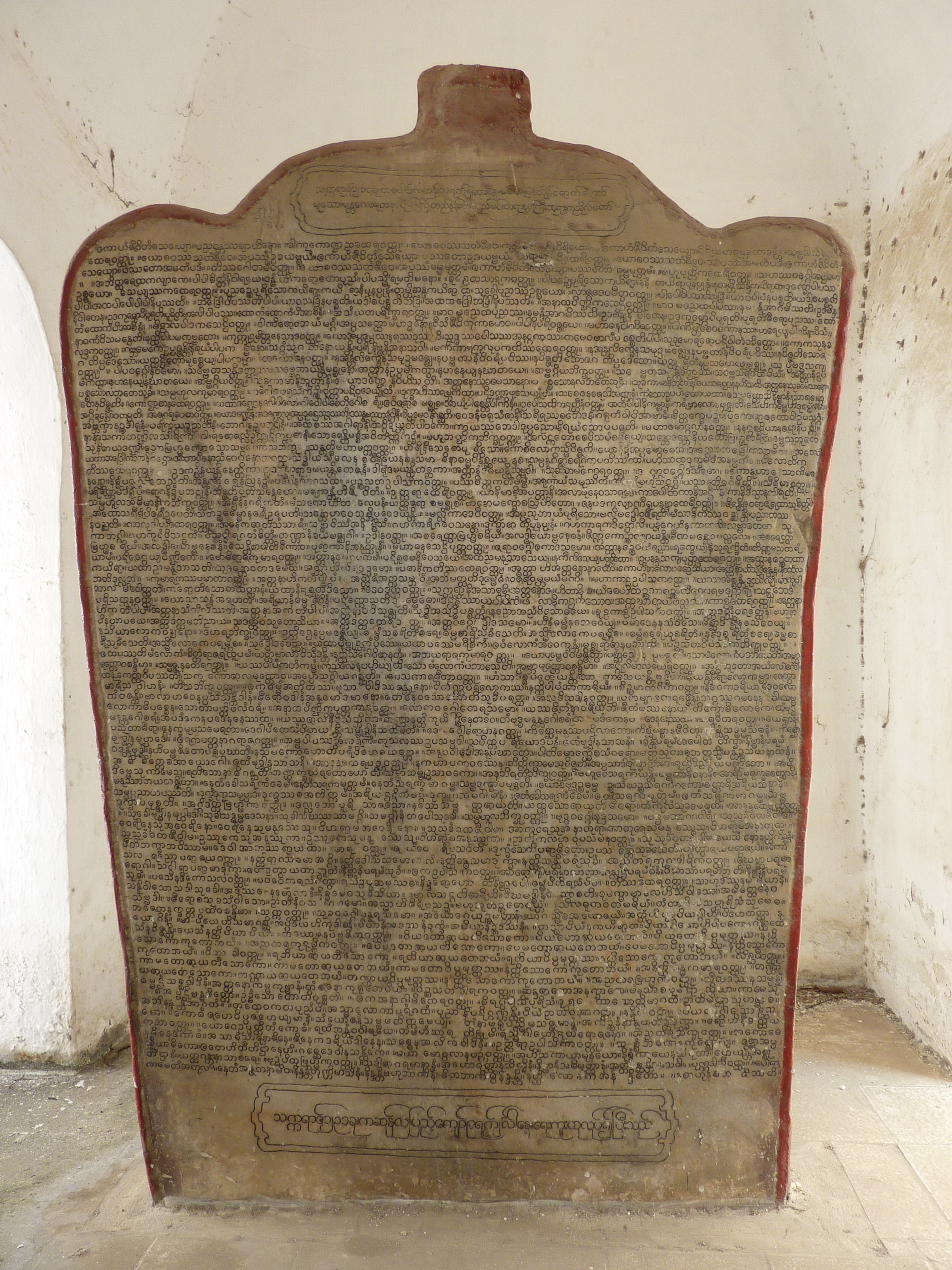 11 Dhammapada Page 2, Kuthodaw at Mandalay